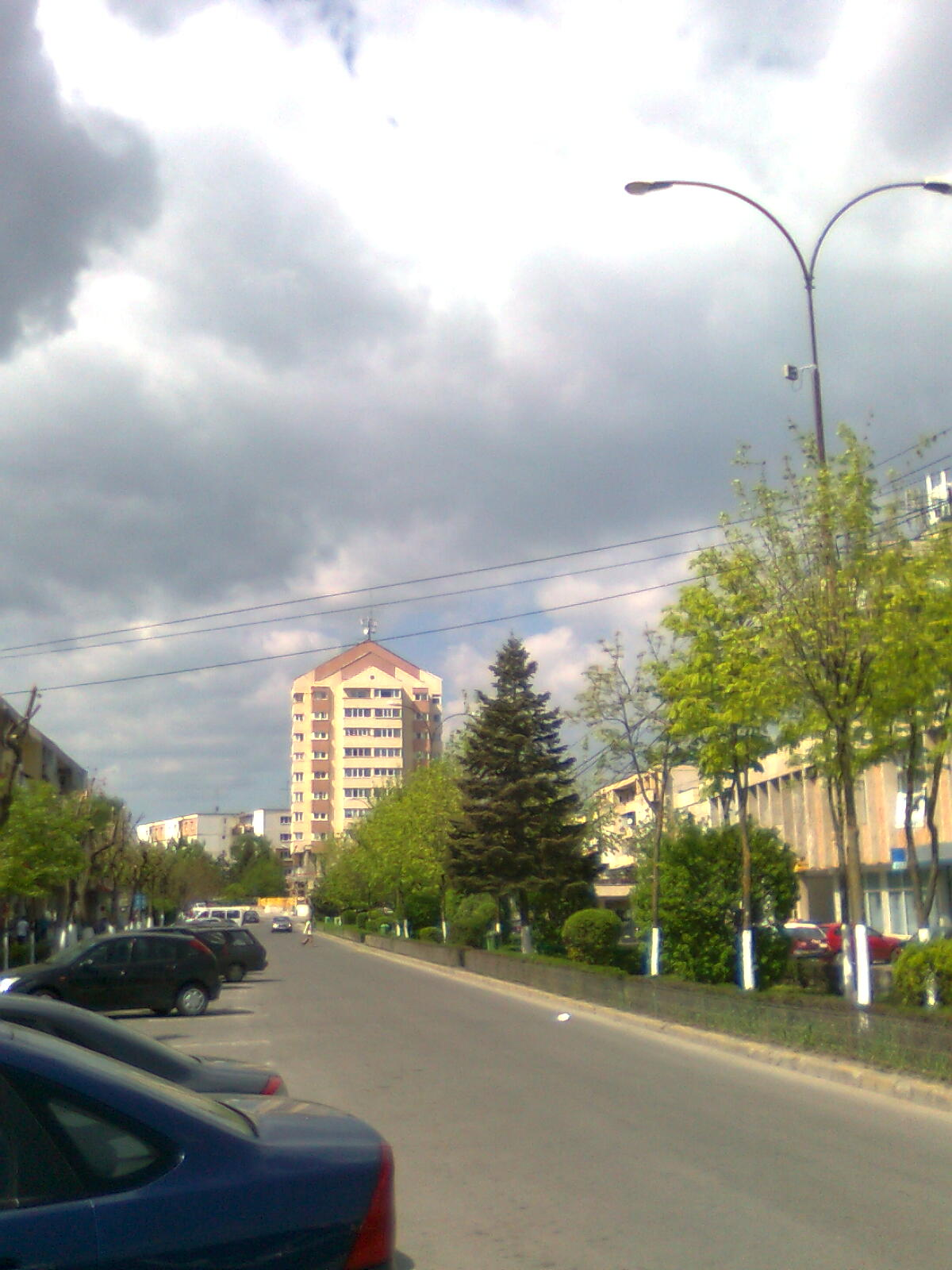 Kolozsvári Pasteur utca vége